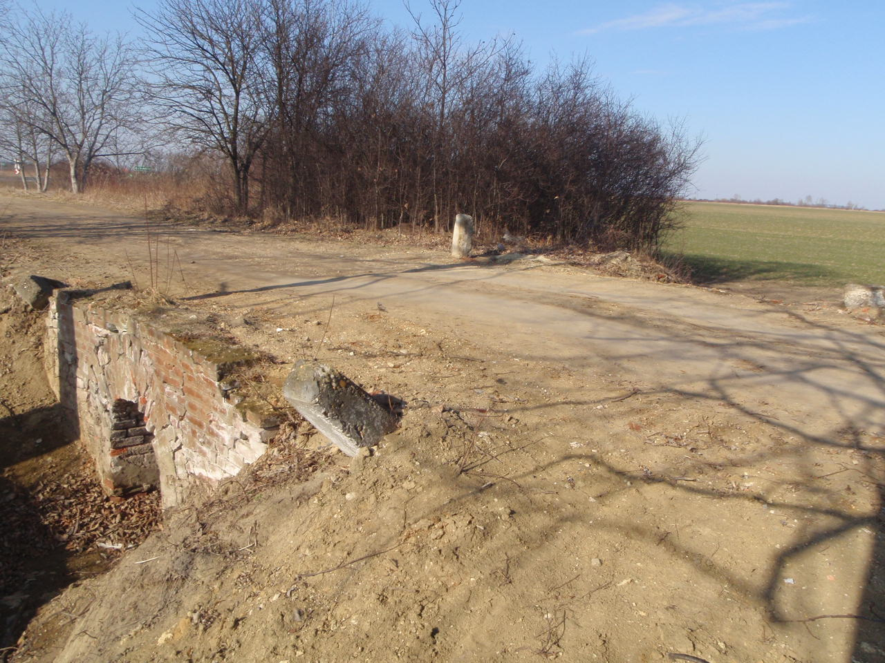 87-es főút ívátvágás miatt felhagyott darabja Gencsapáti mellett